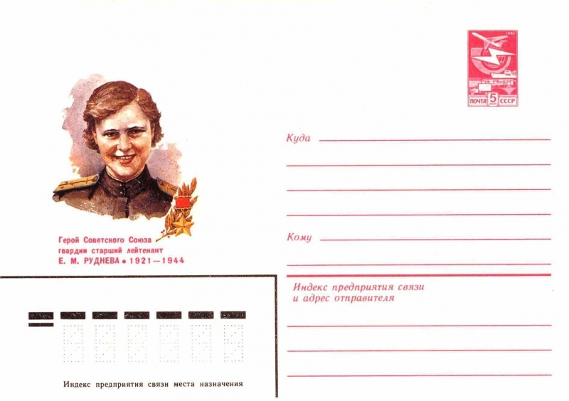 Художественные маркированные конверты 1983 года.